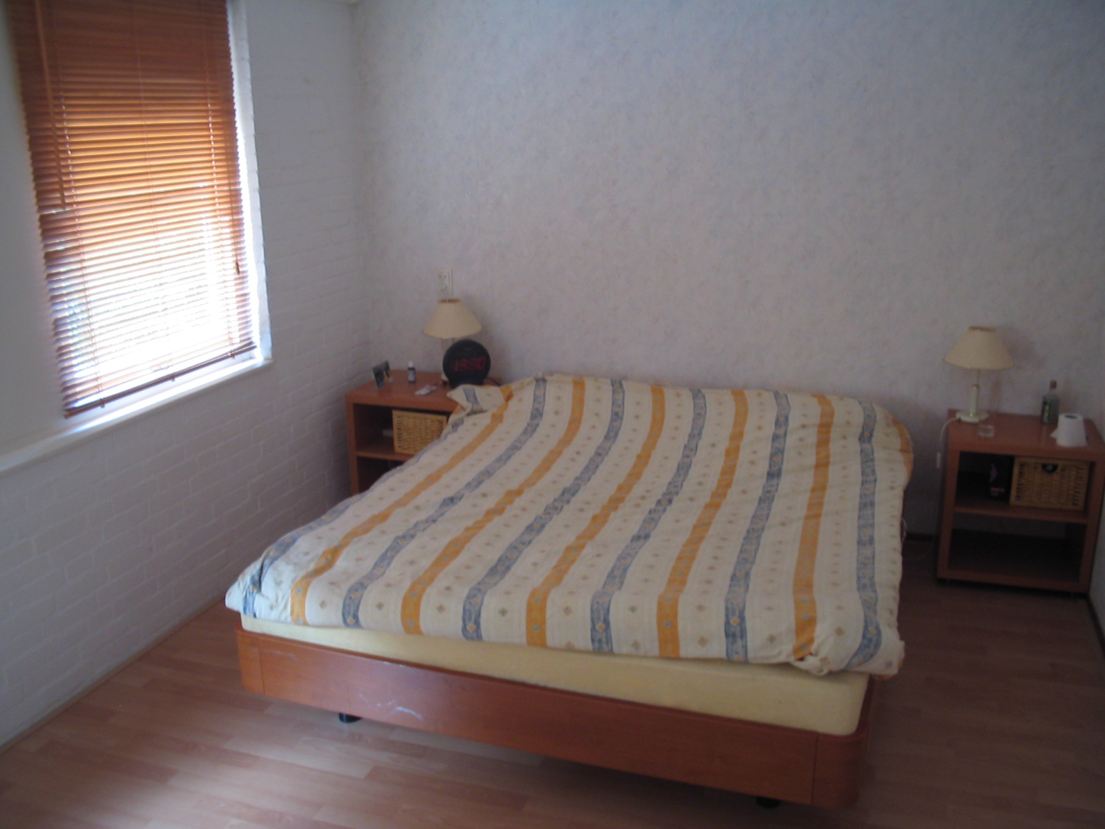 Een slaapkamer.